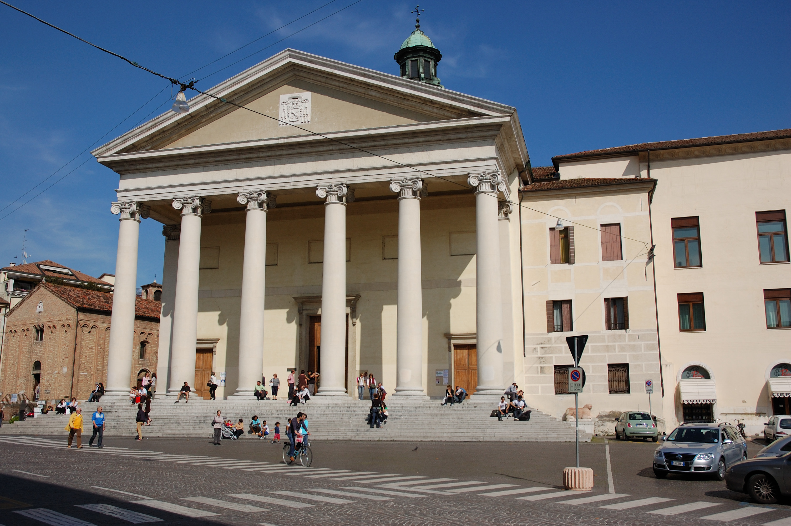 Neoclassic facade - Duomo di Treviso